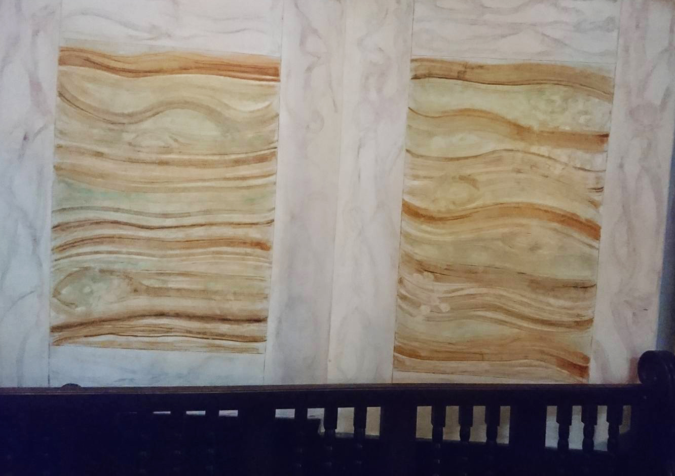 Paredes de mármol pintados de la Parroquia Inmaculada Concepción (Belgrano)